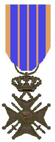 Luxemburg 1944 Croix de Guerre